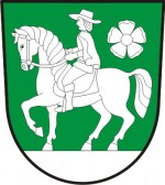 Újezdec